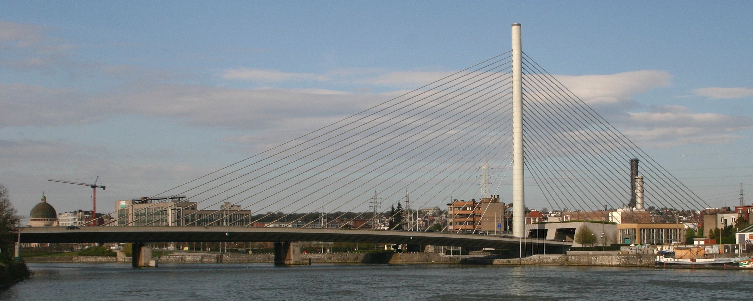 Pont de Liège vu lénks gesinn mat der Entrée vum Tunnel de Kinkempois, riets am Bild. Kategorie:Brécken an der Belsch